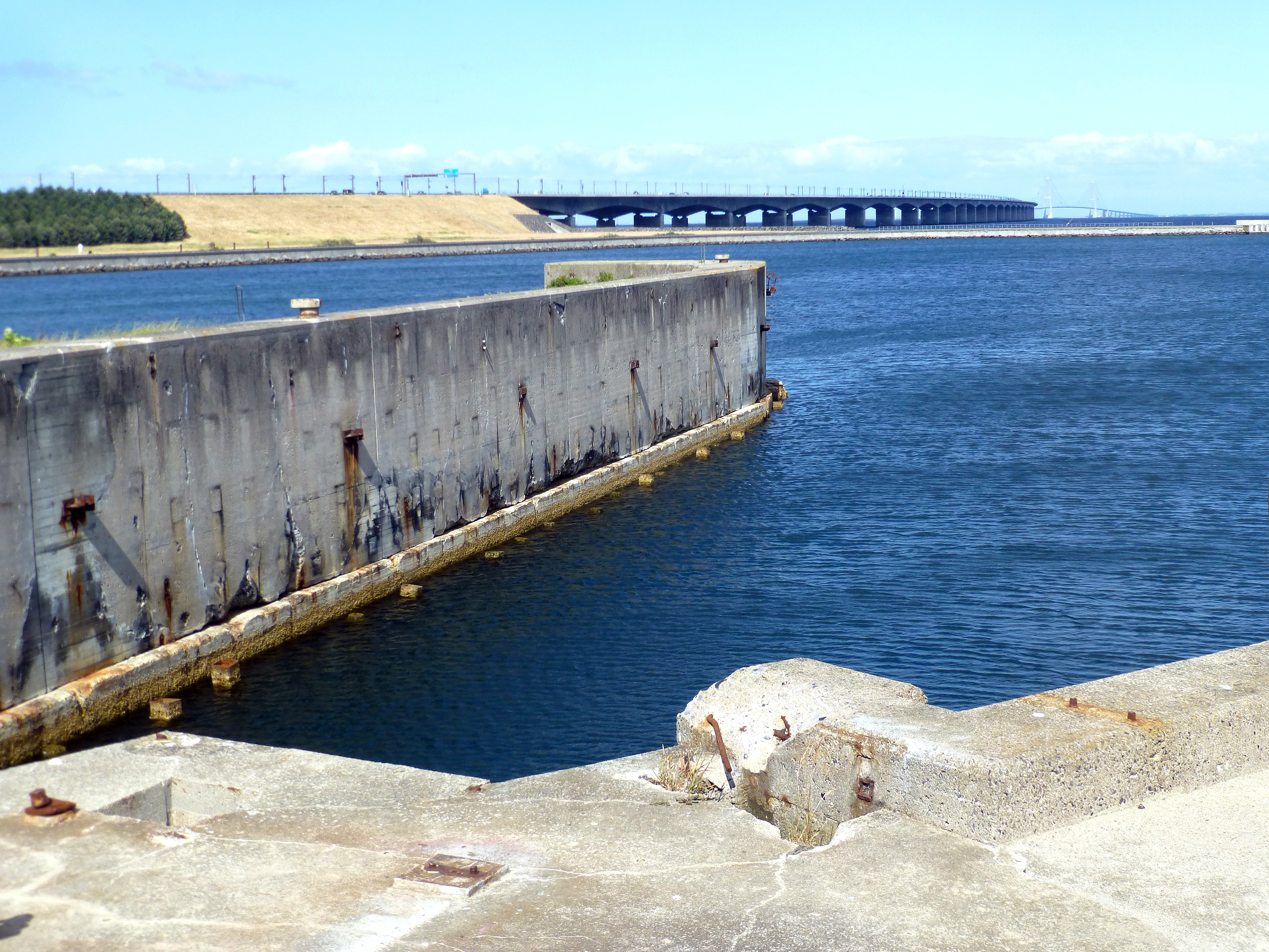 Knudshoved gamle færgehavn med Storebæltsbroen i baggrunden